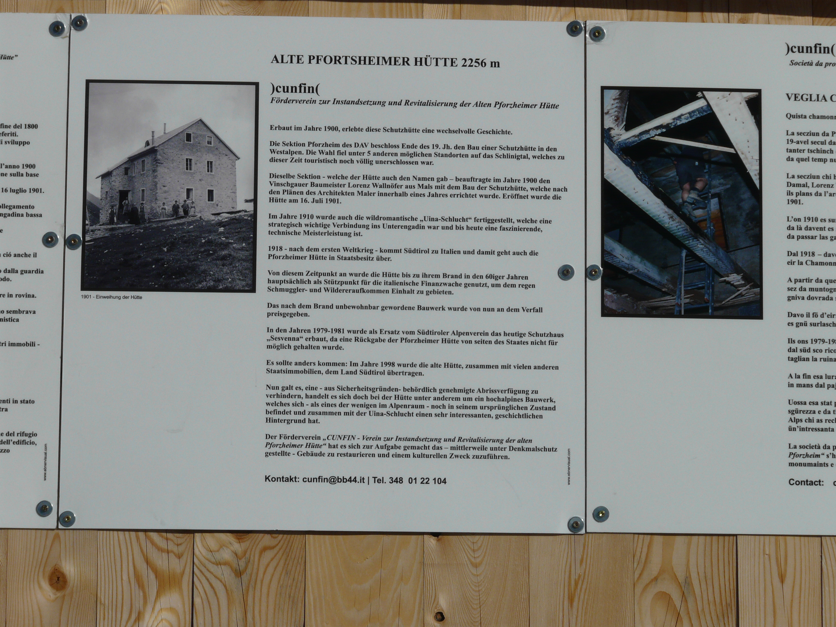 Der deutschsprachige Teil, der bei der Ruine der Alten Pforzheimer Hütte gelegenen Infotafel.